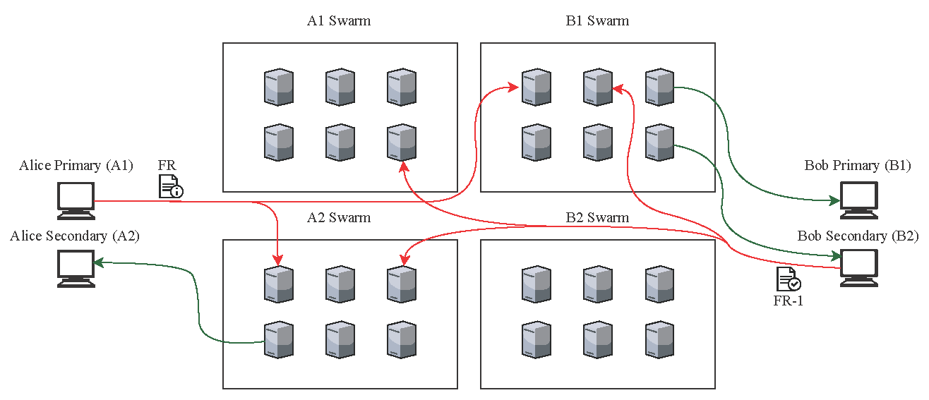 Мульти-устройства в Session. Передача сообщения на несколько устройств одновременно.